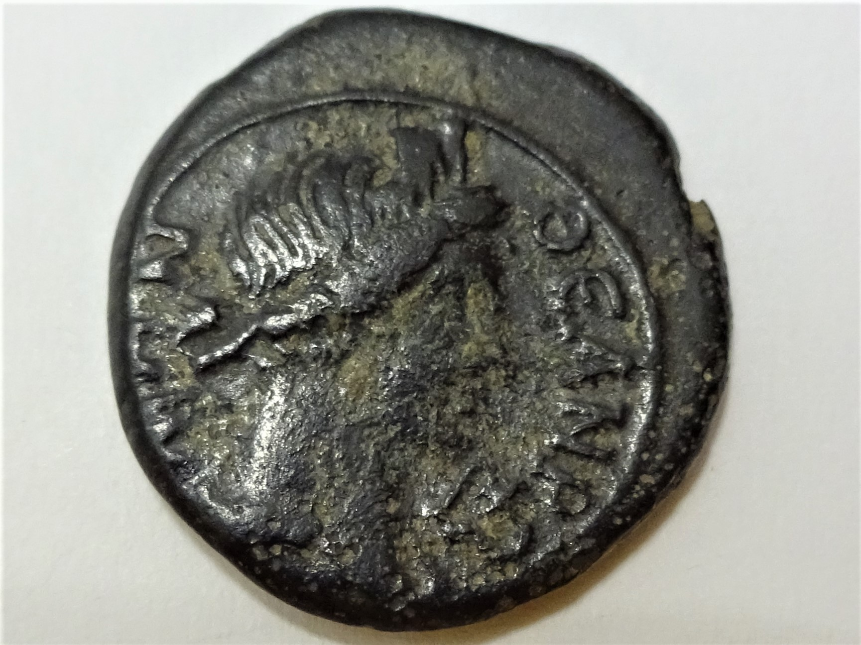 Rückseite der Münze aus Pergamon, ca. 17-18 mm, Roman Prov. Coins I. Nr. 2374